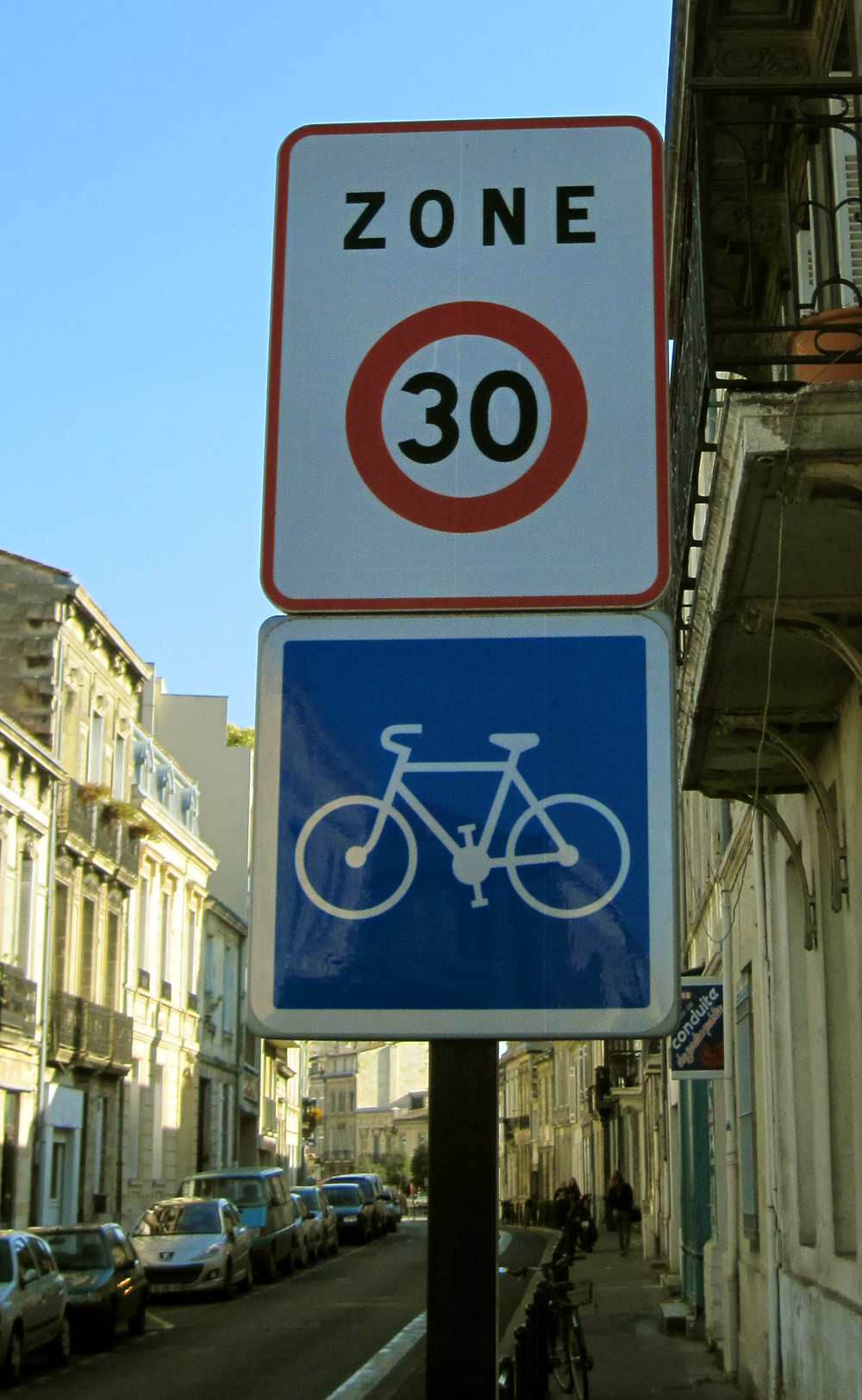 Panneau Zone 30. Bordeaux.